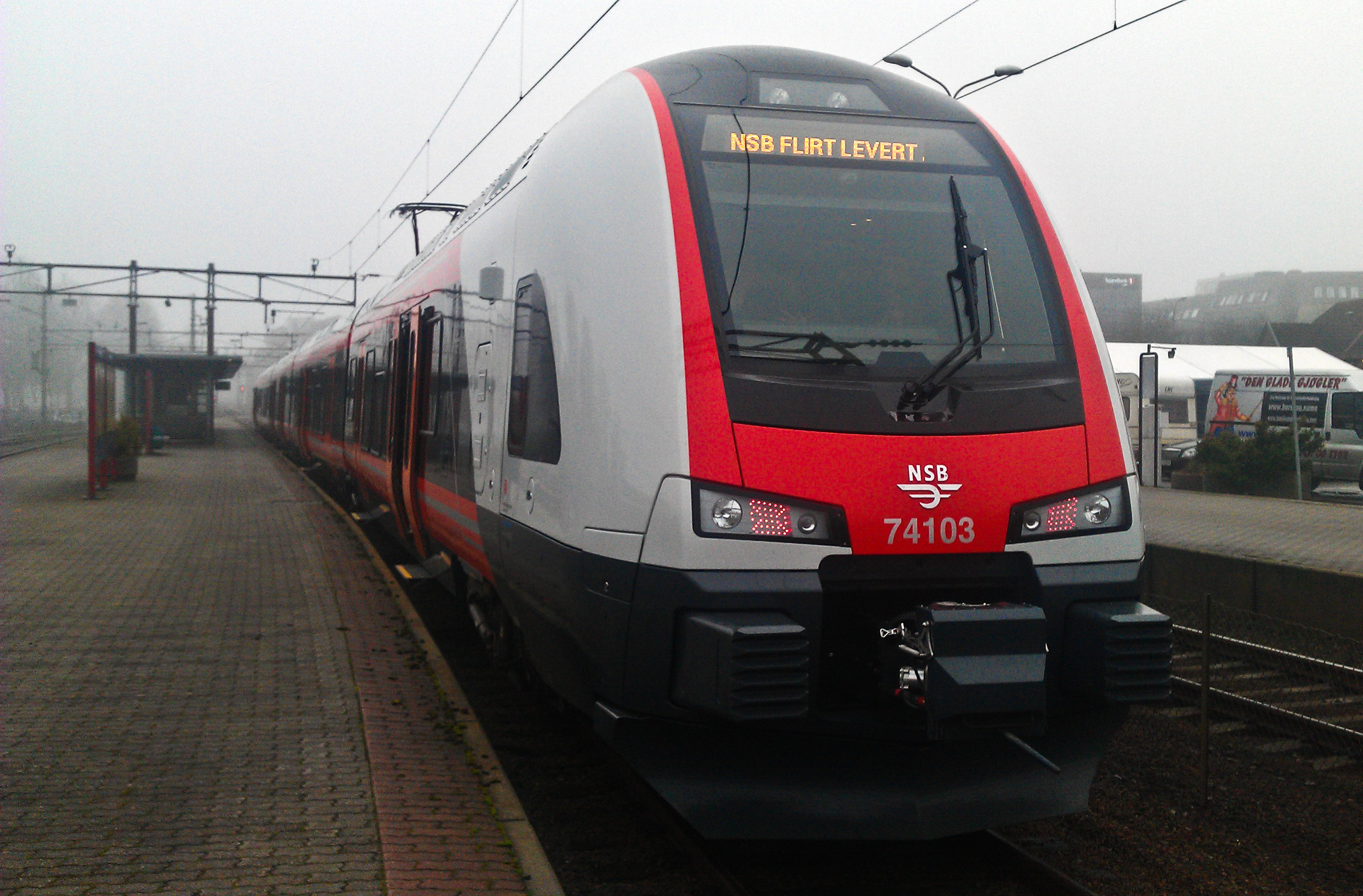 NSB type 74 "Flirt" motorvognsett på Tønsberg stasjon